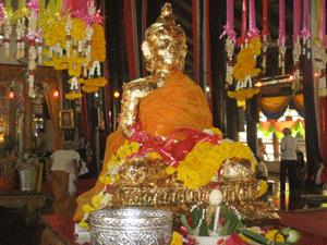 หลวงปู่